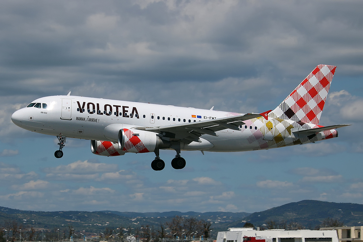 Aircraft: Airbus A319-112 Airline: Volotea Serial #: 2113